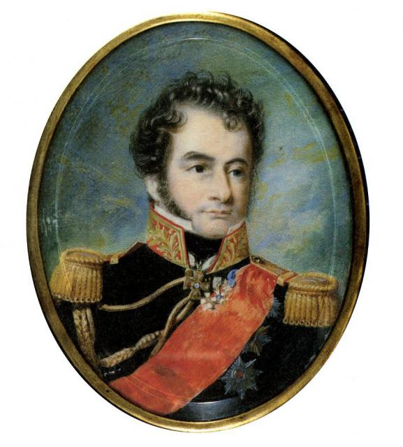 Граф Павел Андреевич Шувалов (1776-1823)